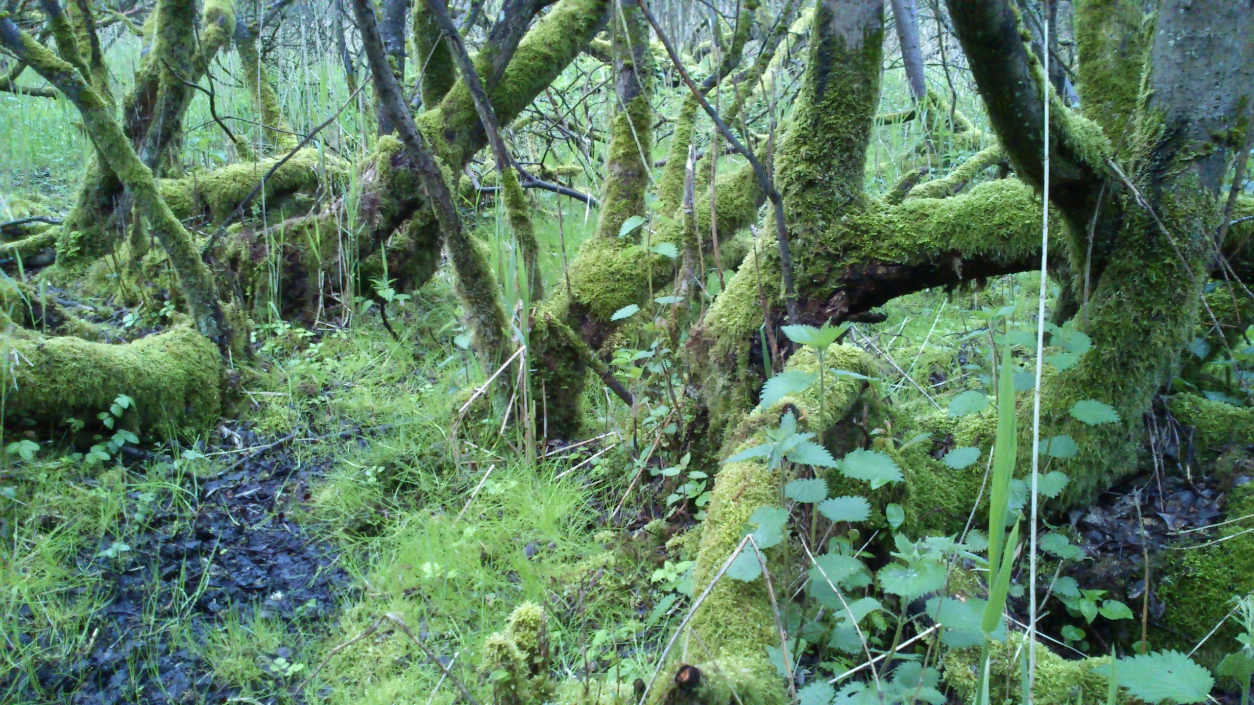 Mosen er flere steder et labyrintisk virvar af mosbegroede grene og lavstammede træer. Det giver en stemning af urskov og man kan nemt miste orienteringen, så snart man er bare få meter inde. Man mødes ofte af en liflig og kraftig duft af blomsternektar i april-maj. Den stammer fra grå-pilens blomster. Billedet her er fra Tilst Mose, der udgør den syd-vestlige del af moseområdet.